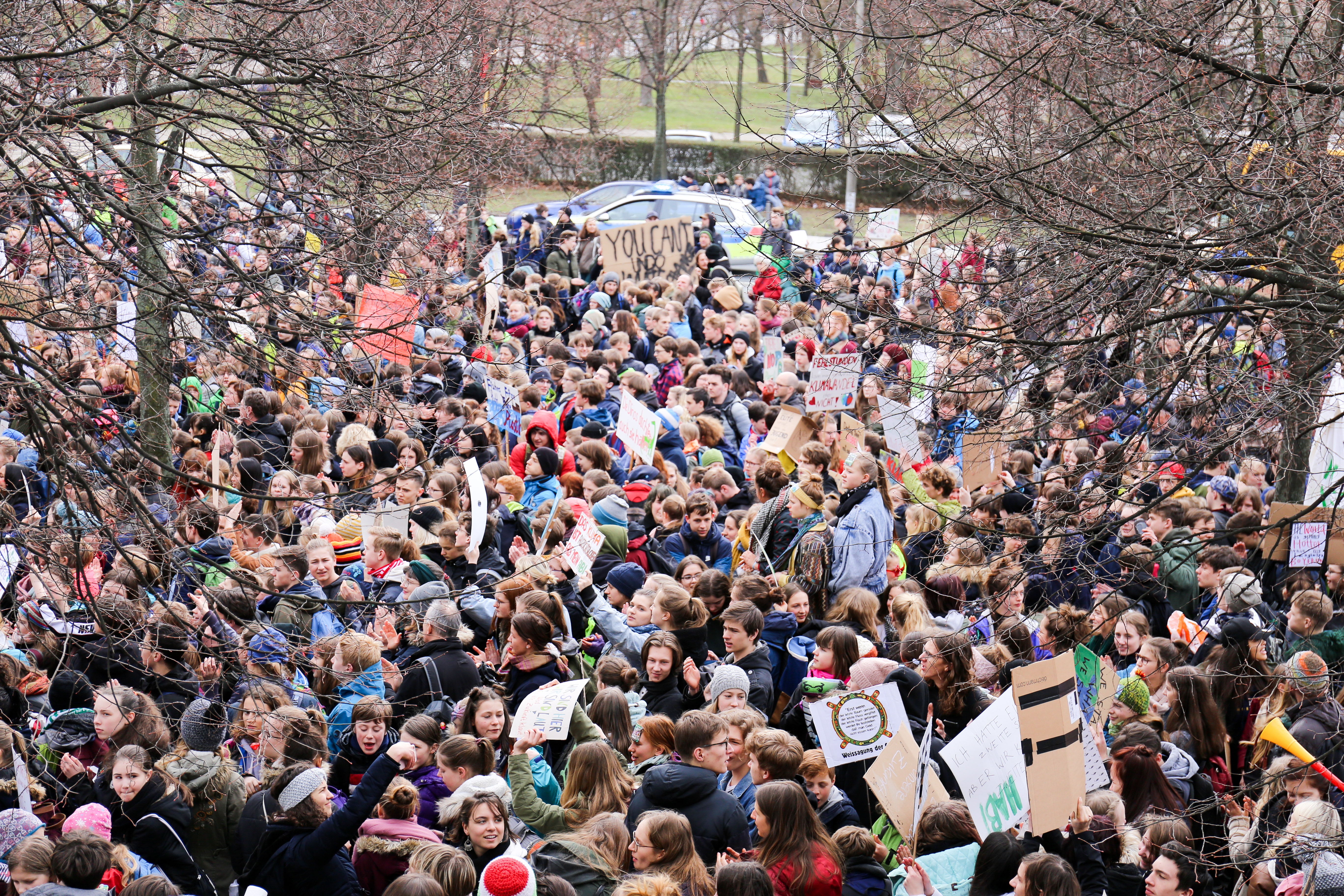 Fridays For Future-Demonstration in Dresden. Die Demonstration umfasste etwa 5000 Personen und zog vom St. Benno-Gymnasium zum Neustädter Markt (Goldener Reiter).